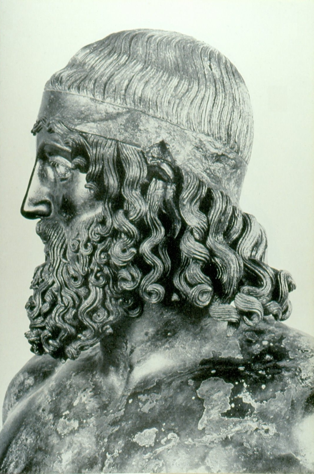 Reggio Calabria, museo Archeologico nazionale, foto E. Formigli